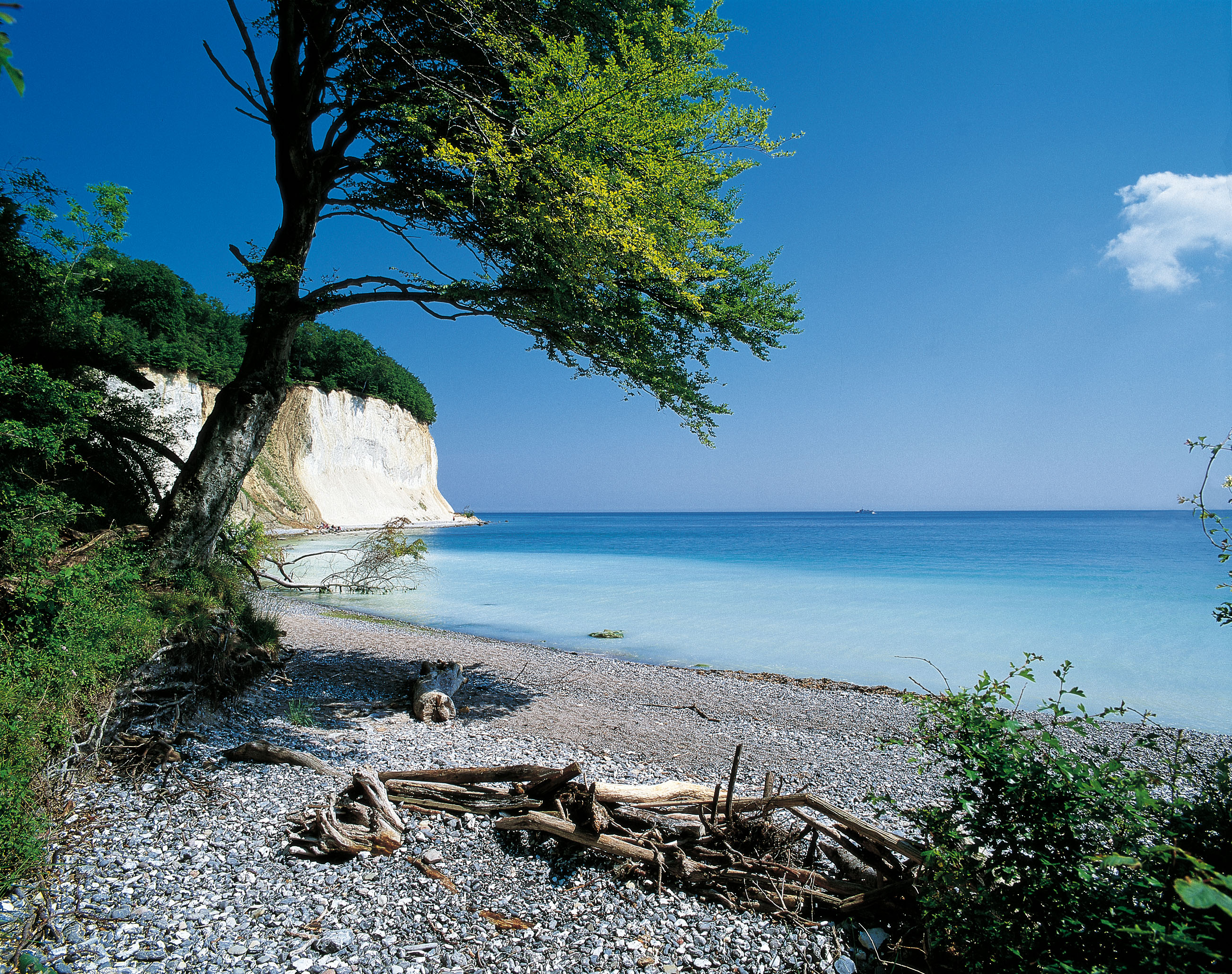 Steinstrand an der Stubbenkammer auf der Insel Rügen, Nationalpark Jasmund